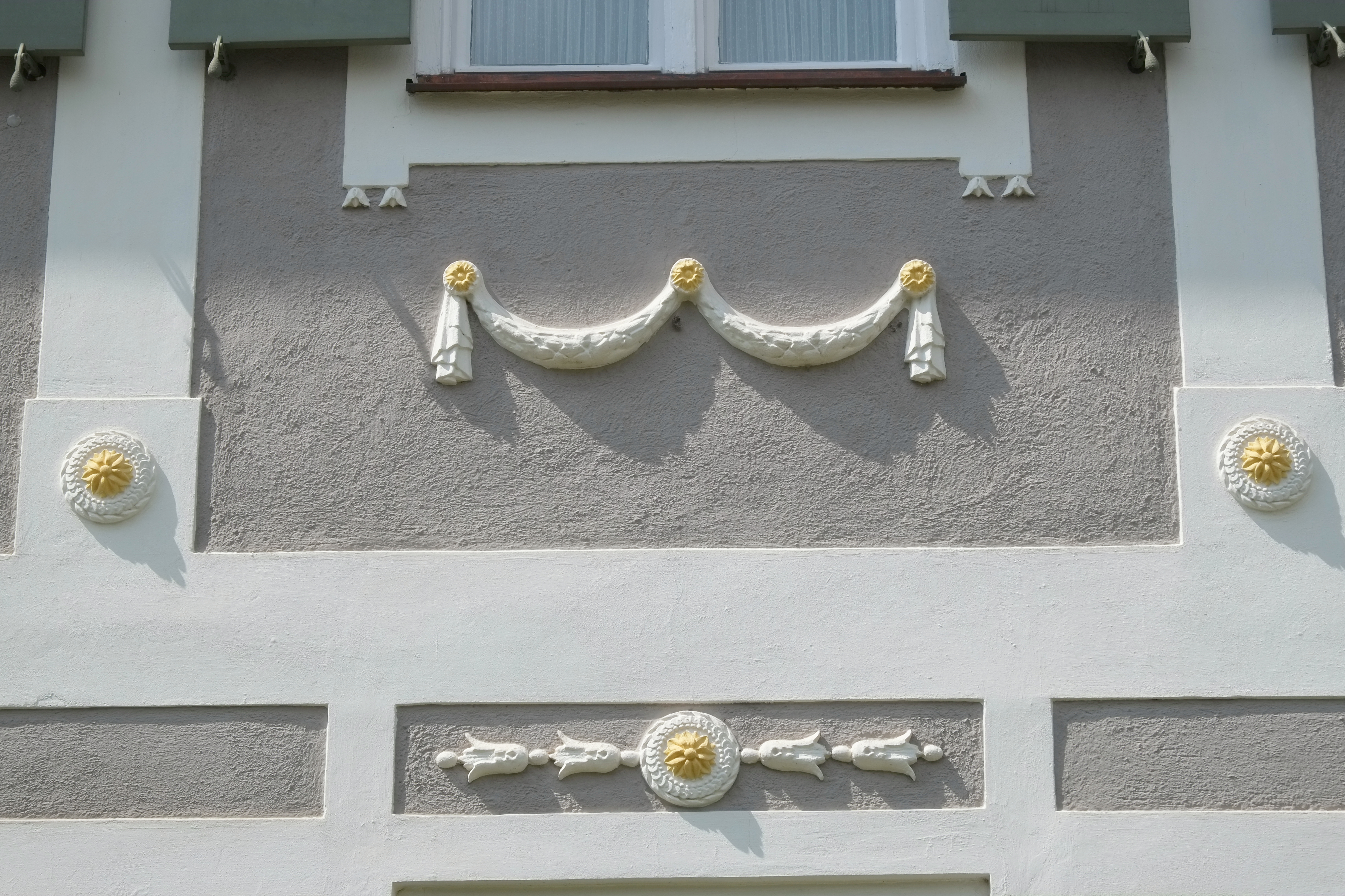 Pfarrhaus in Steinekirch im Landkreis Augsburg (Bayern, Deutschland)